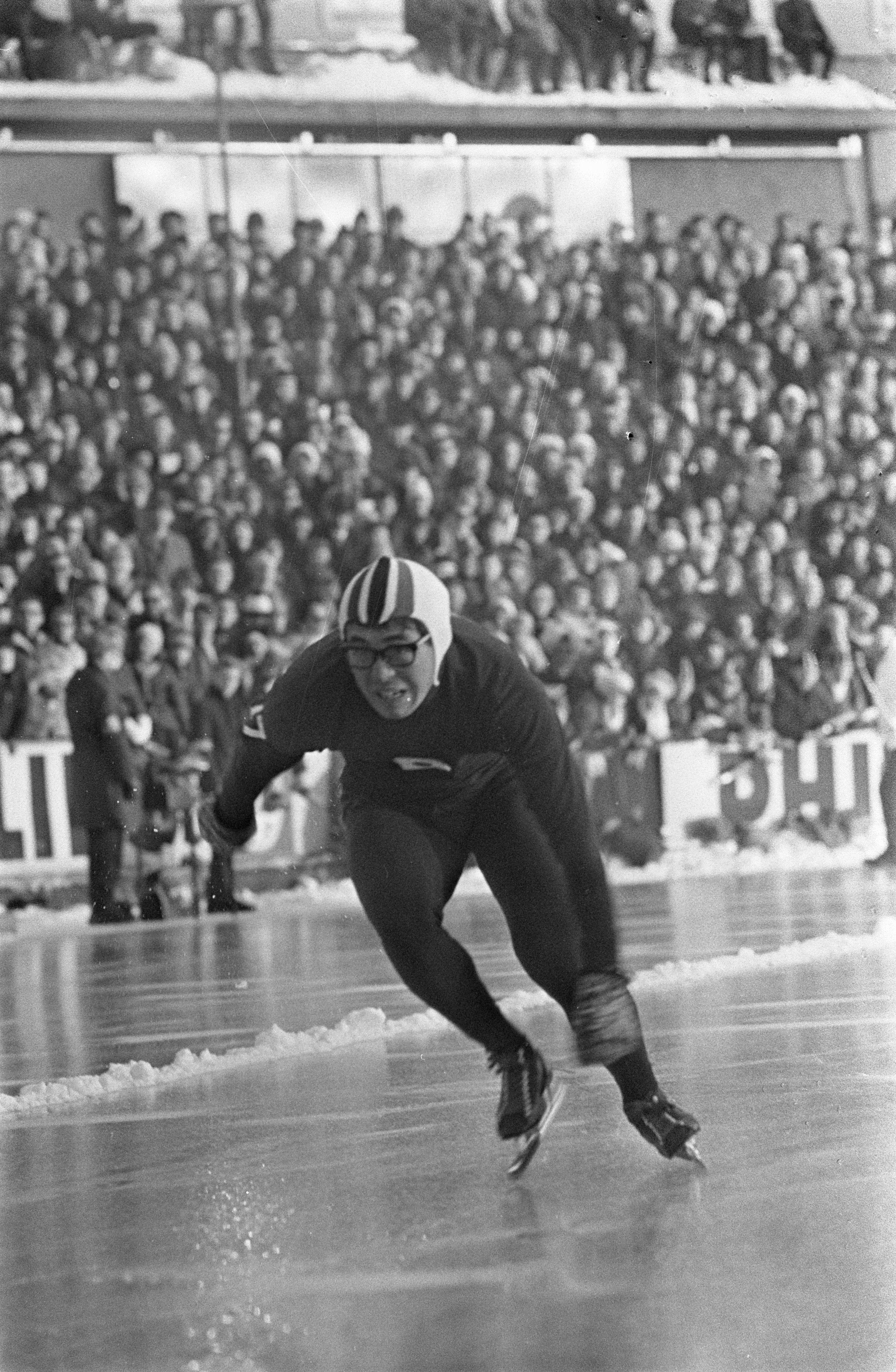 Collectie / Archief : Fotocollectie Anefo Reportage / Serie : [ onbekend ] Beschrijving : Wereldkampioenschappen schaatsen in Oslo, Suzuki (Japan) in aktie op 500 meter Datum : 11 februari 1967 Locatie : Noorwegen, Oslo Trefwoorden : schaatsen, sport, wereldkampioenschappen Persoonsnaam : Suzuki, Keiichi Instellingsnaam : Suzuki Fotograaf : Kroon, Ron / Anefo Auteursrechthebbende : Nationaal Archief Materiaalsoort : Negatief (zwart/wit) Nummer archiefinventaris : bekijk toegang 2.24.01.05 Bestanddeelnummer : 920-0663